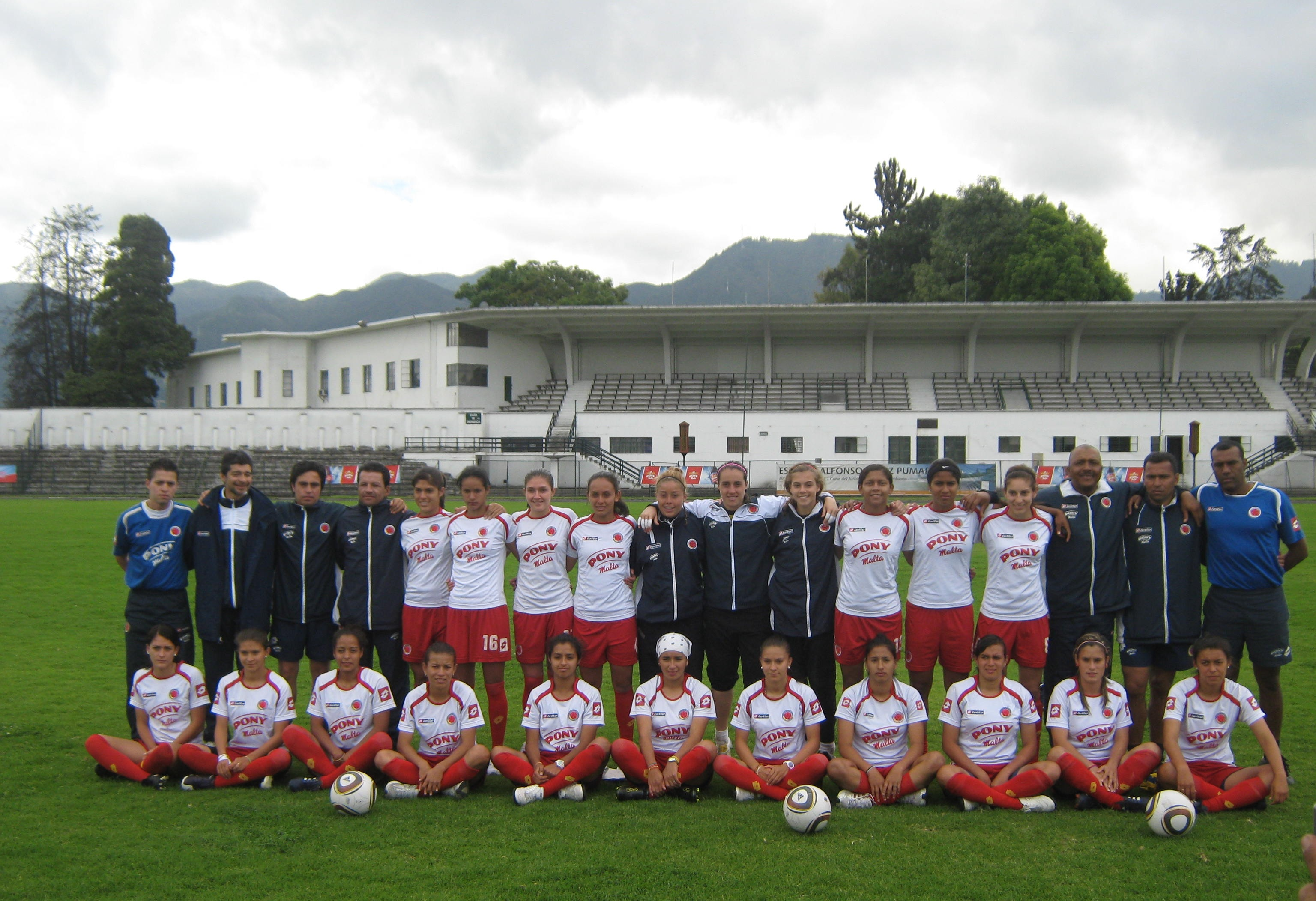 La foto del día 30 de junio de 2010 tomada en el estadio de la Universidad Nacional muestra el cuerpo técnico y la selección sub 20 que logró terminar cuarta en un mundial de alemania.